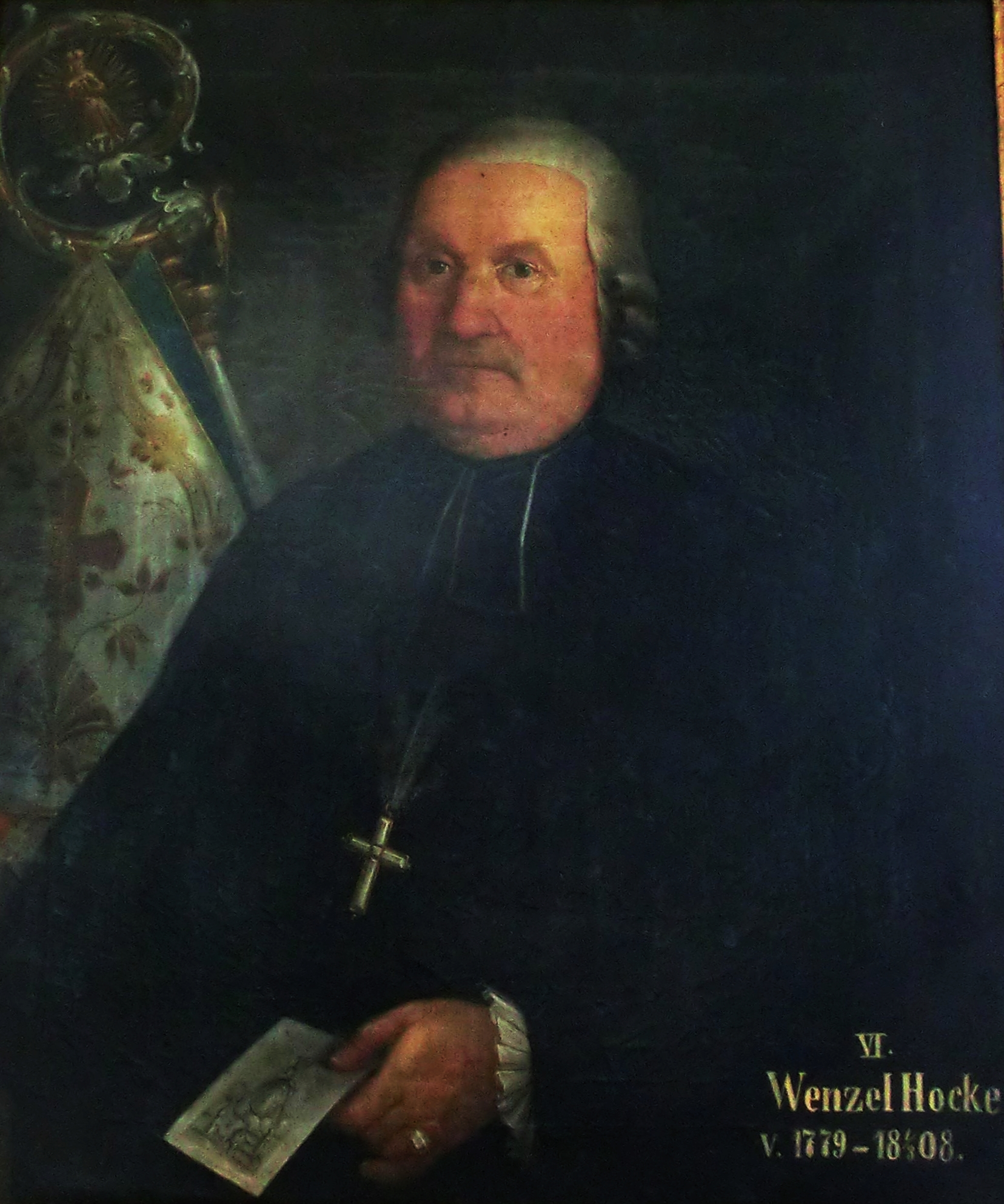 1808 Wenzel Hocke, 6. infulovaný arciděkan v Horní Polici.